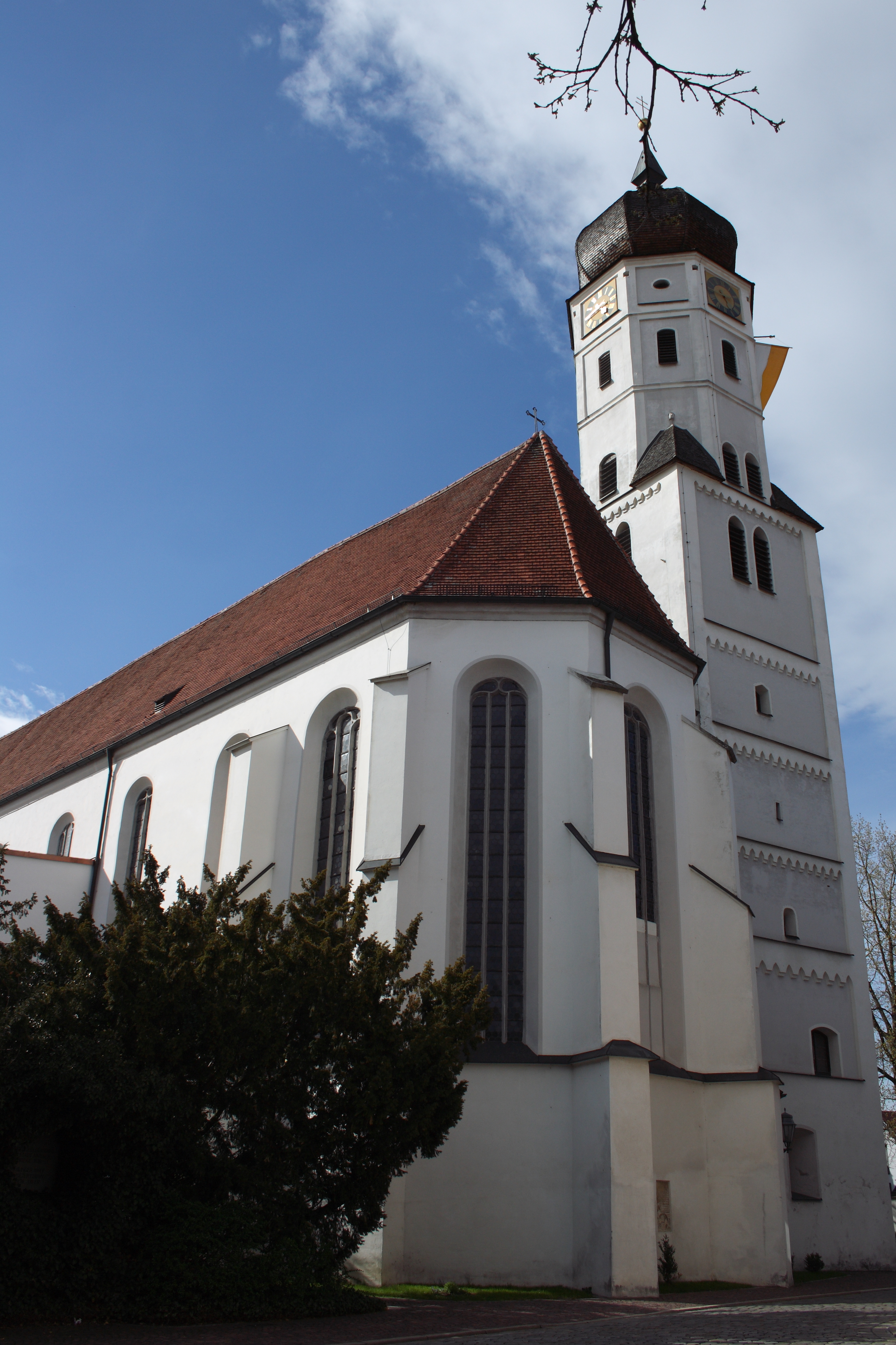 Katholische Stadtpfarrkirche Mariä Himmelfahrt in Aichach im Landkreis Aichach-Friedberg (Bayern)